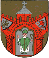 Pierwszy herb miasta Koszalina w latach 1266…1440.